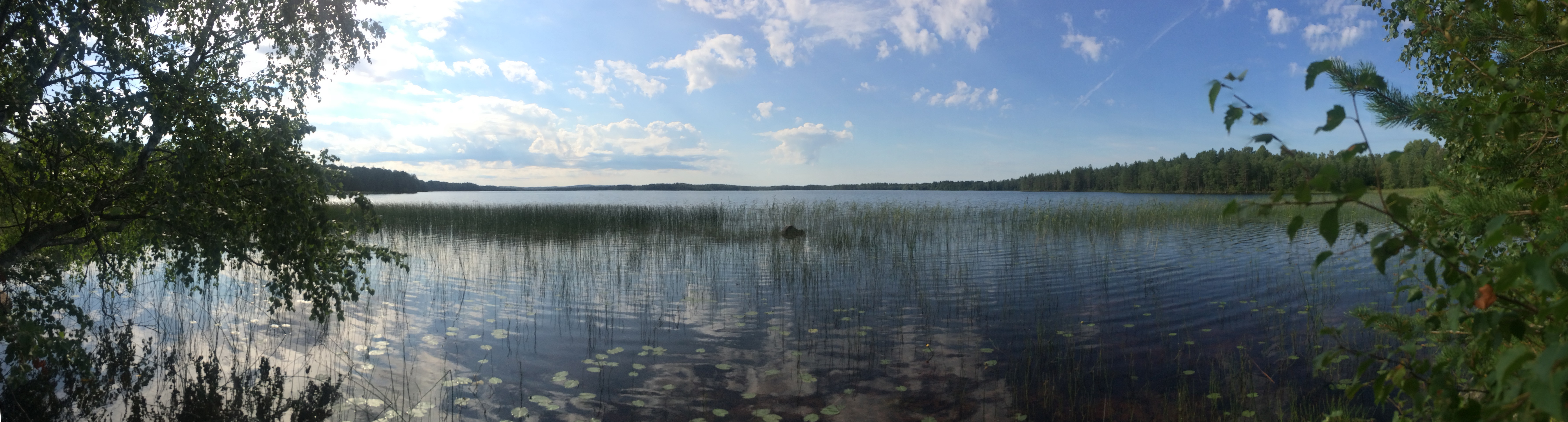 Торосозеро (озеро, Медвежьегорский район)